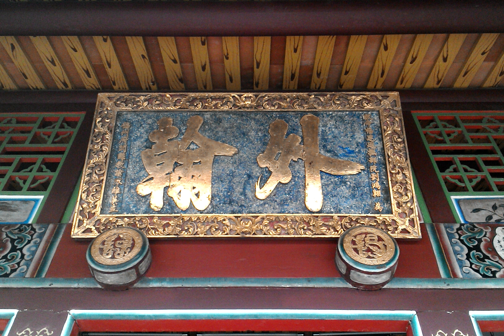 陳悅記祖宅中劉鴻翱所贈匾額,台北市大同區蘭州次分區老師里